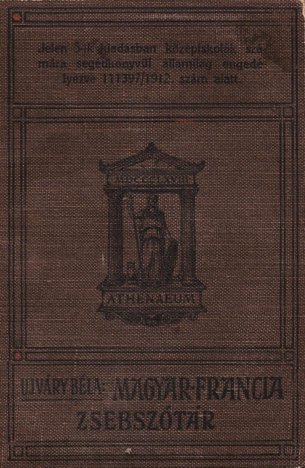 Újvári Béla: Magyar-franczia zsebszótár, 1900 k.